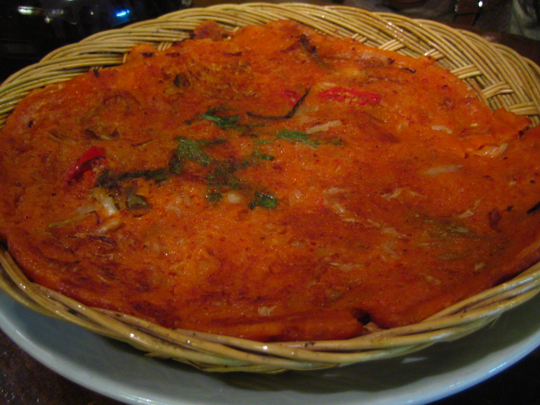 김치전